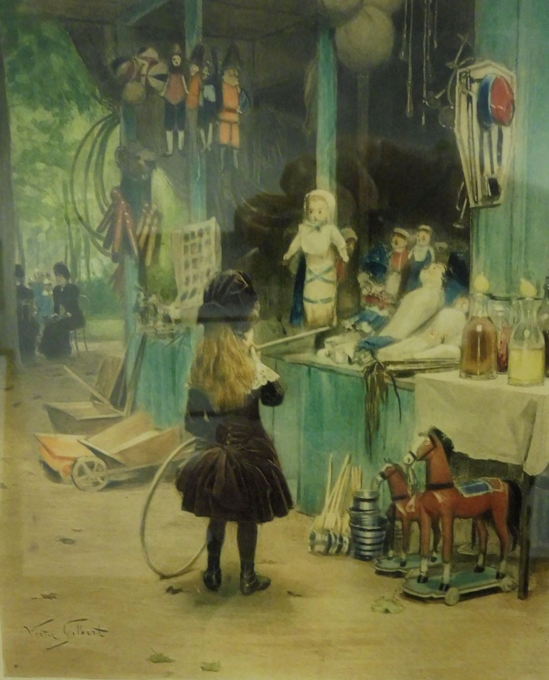 Le magasin de joujoux par Victor Gilbert, Exposition Goupil, bibliothèque municipale Flora Tristan à Bordeaux-Belcier, été 2017.